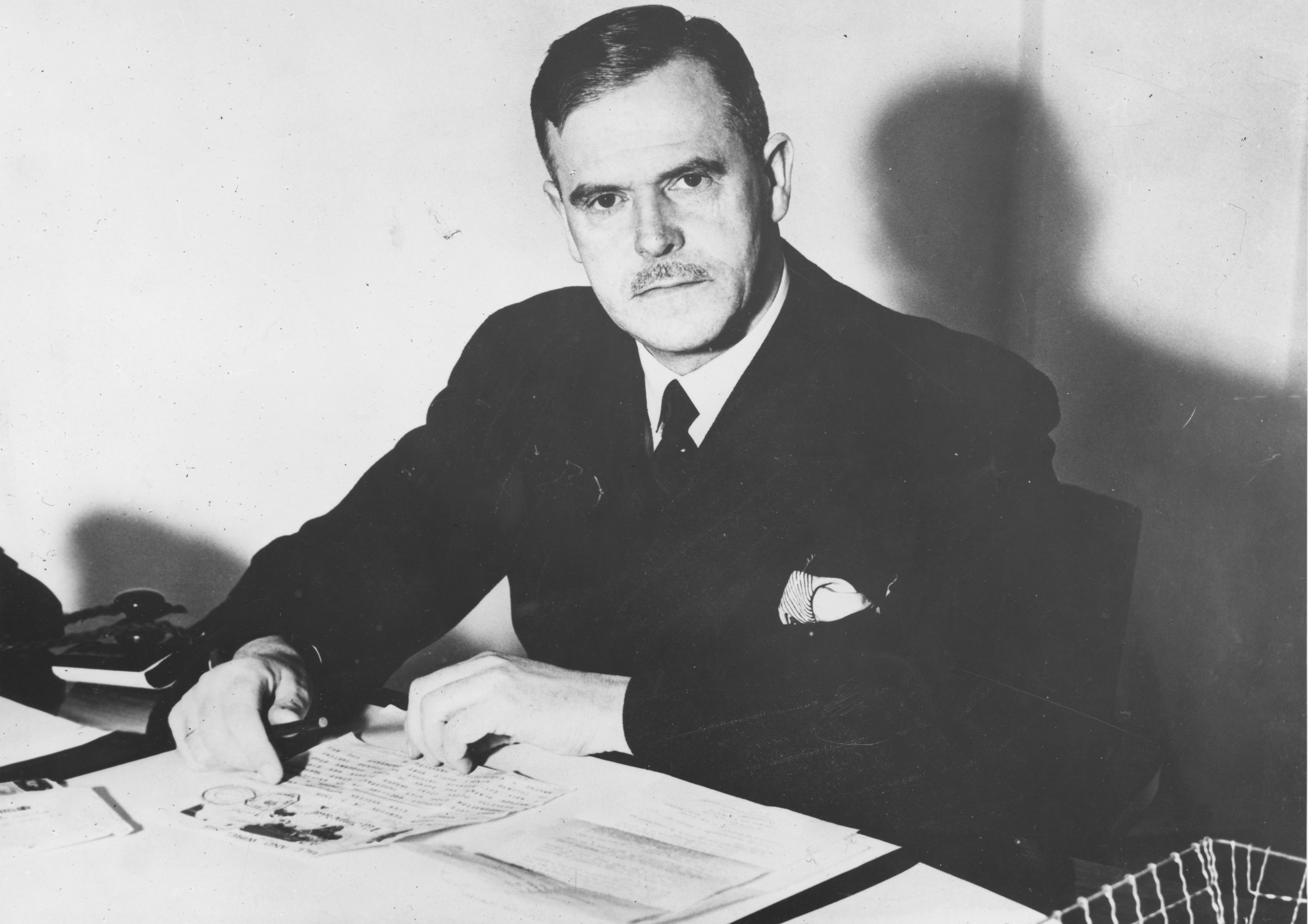 Sven Nielsen (1883–1958), offiser, forsikringsmann og stortingsmann (H). Konsultativ statsråd, senere handelsminister, i Nygaardsvold-regjeringen. Fotopositiv i bildesamling fra London under den andre verdenskrig, Arne Fjellbus privatarkiv.